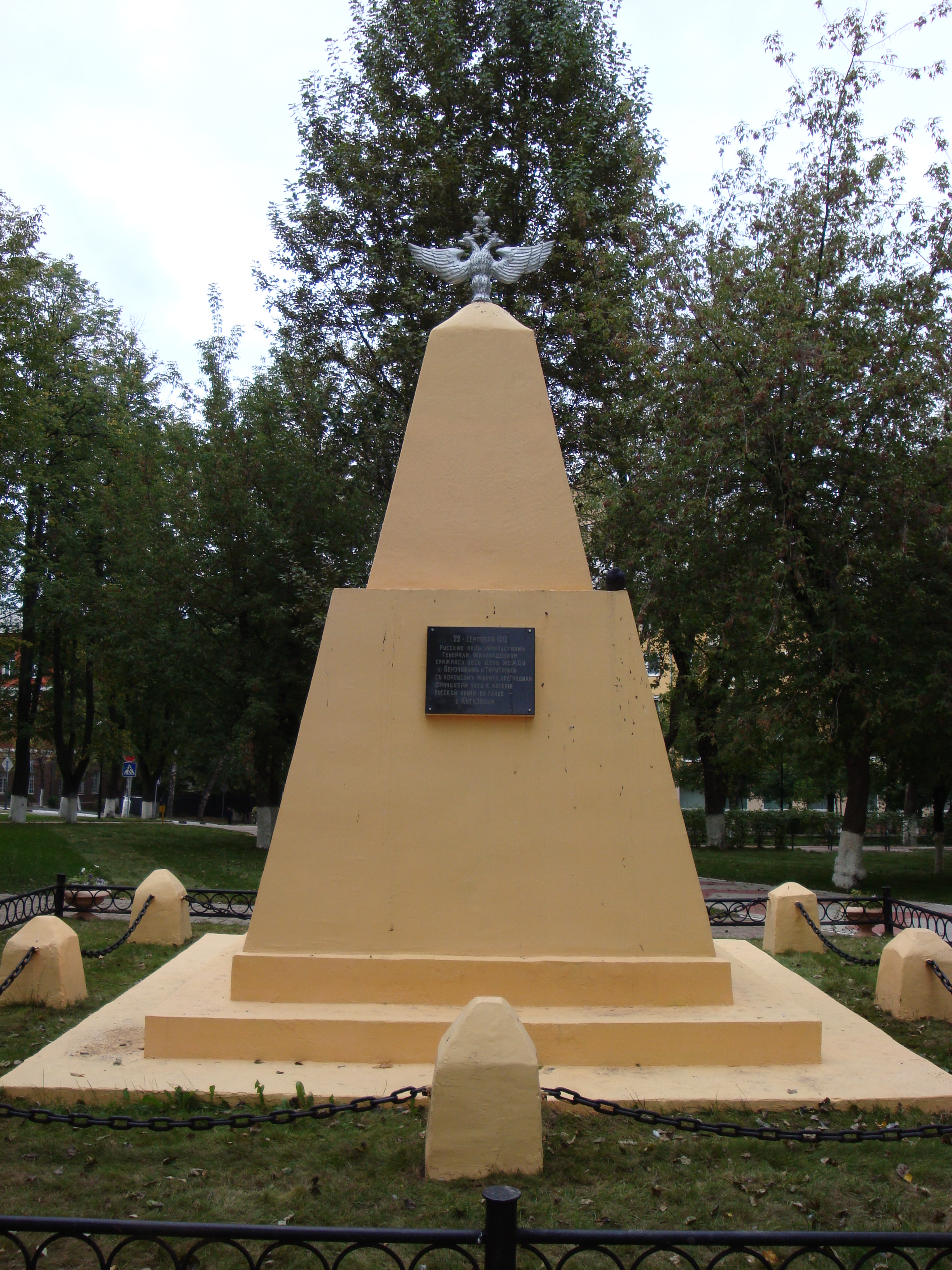 Памятник в Подольске, посвящённый Тарутинскому манёвру 1812 года